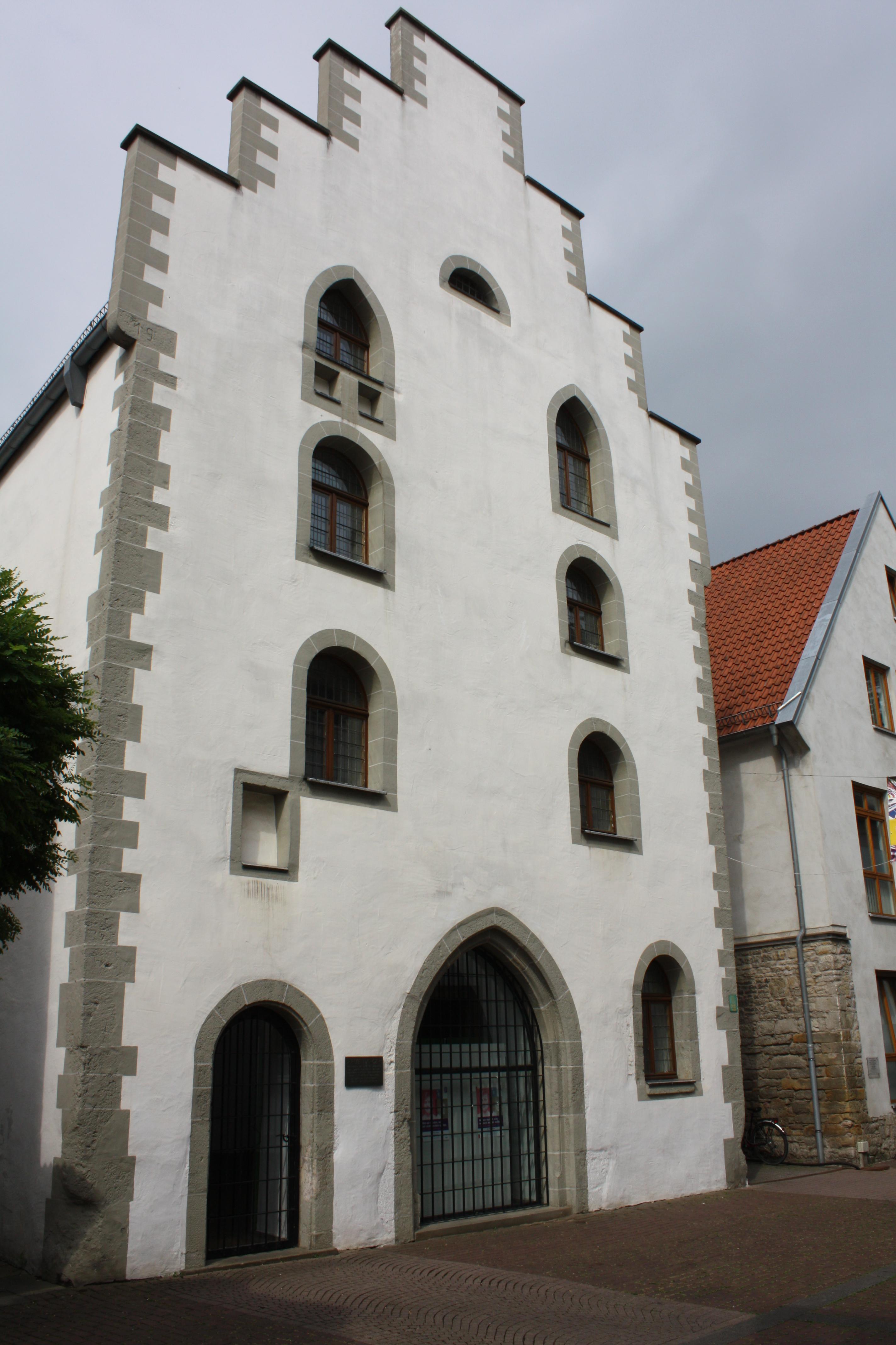 Alte Waage in Brakel. Um 1350 Haus der Ritter von Modexen, ab 1533 Gefängnis, Speicher und Stadtwaage. 1979 Restauriert und Treppengiebel wiederhergestellt. Heute Stadtarchiv und Ratssaal.